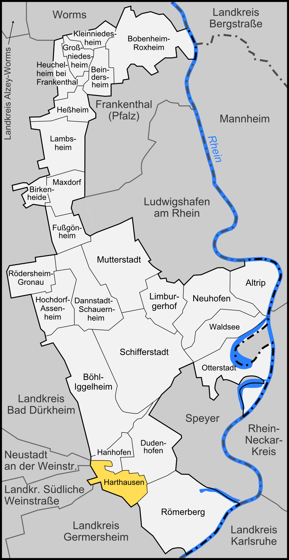 Karte der Gemeinde Harthausen im Rhein-Pfalz-Kreis